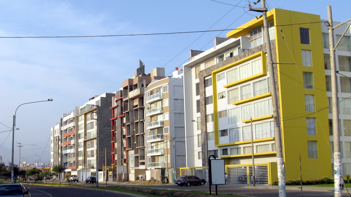 Edificios multifamiliares en la avenida "Cesar vallejo", distrito de "Víctor Larco Herrera" en el área metropolitana de Trujillo (Perú).